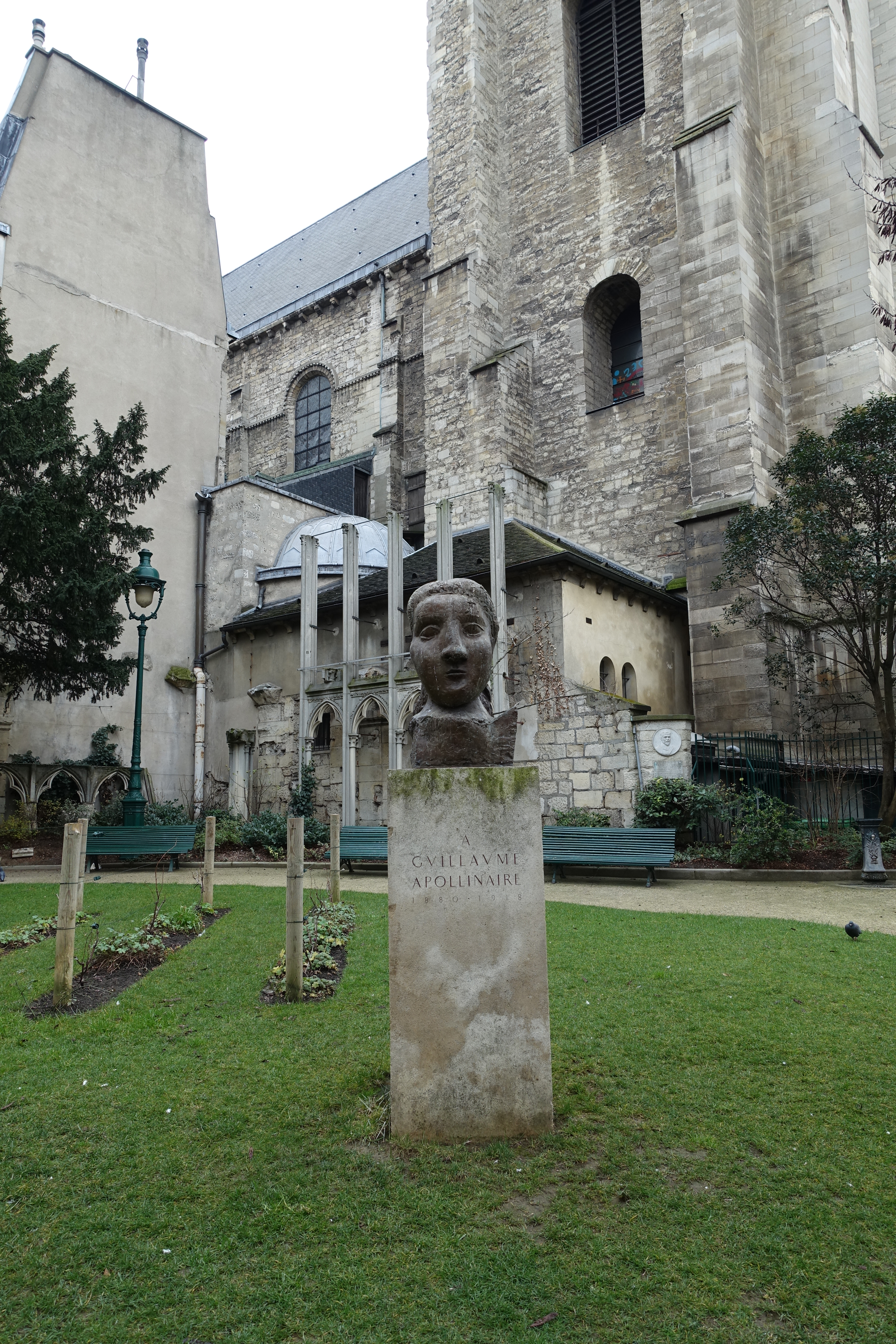 Square Laurent-Prache, Paris. Buste de Guillaume Apollinaire.